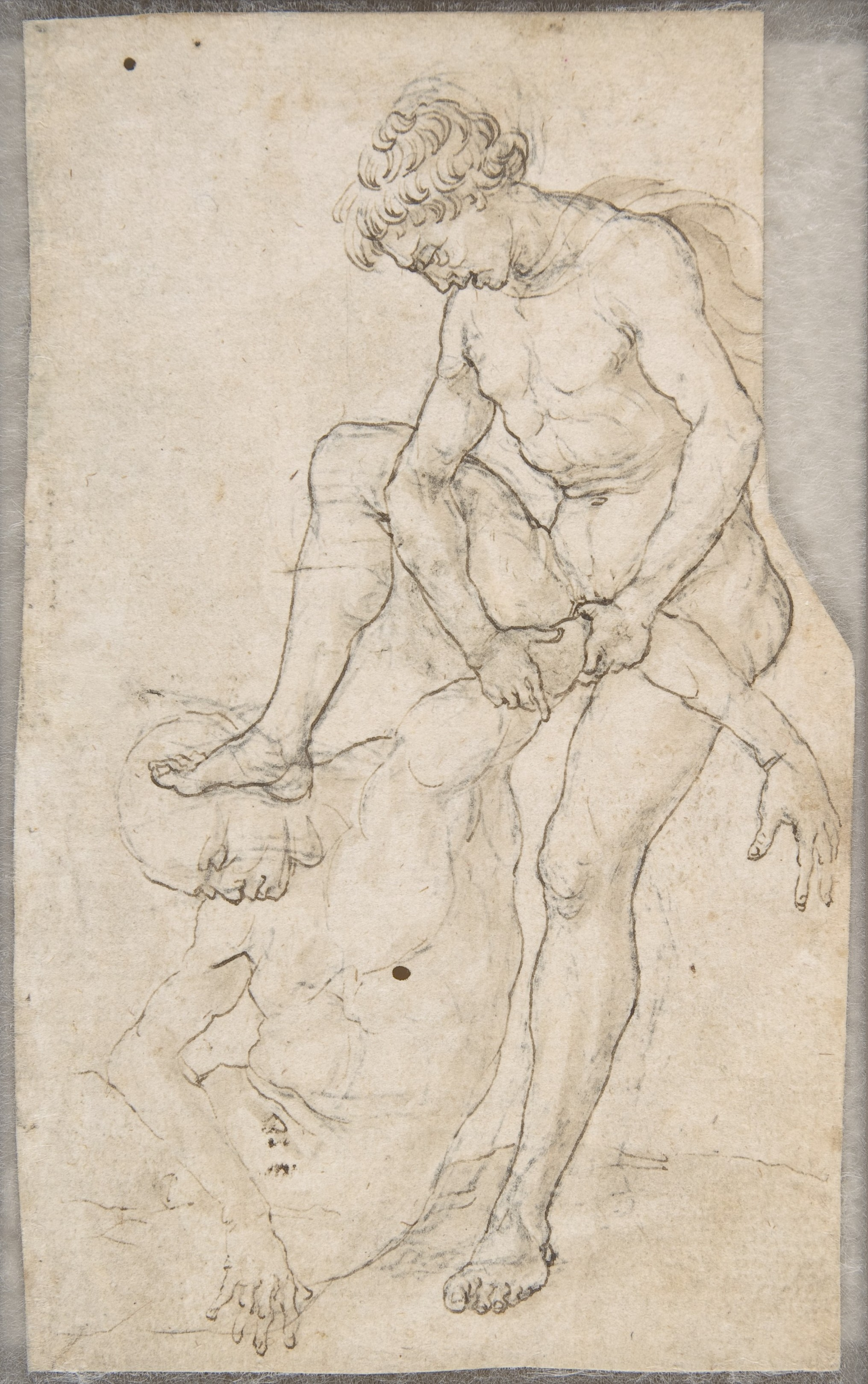 Drawing; Drawings